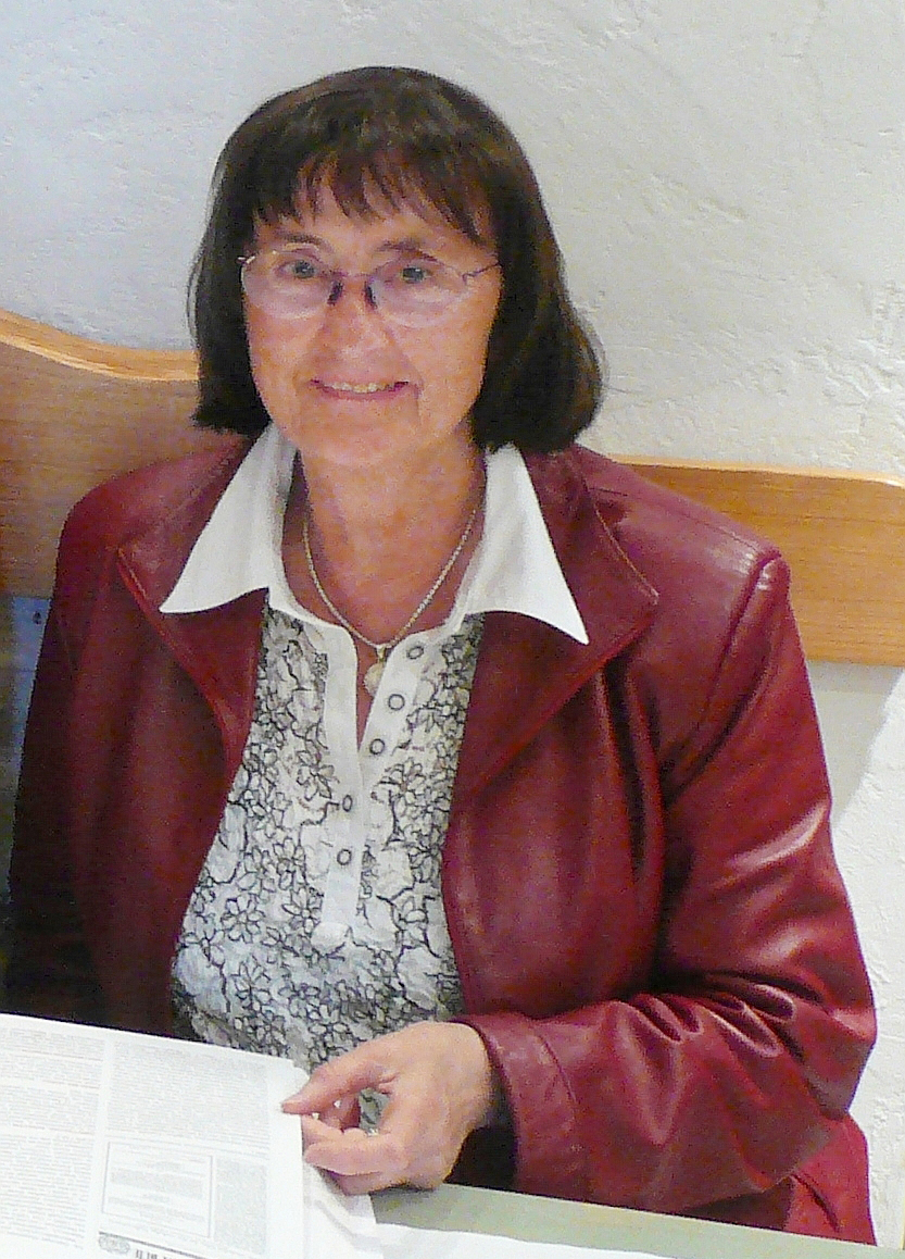 Monika Taubitz w Domu „Skowronki” w Radochowie. 13.05.2012 przed promocją książki A. Herzig, M. Ruchniewicz, K. RuchniewiczŚląsk i jego dzieje, Via Nova 2012